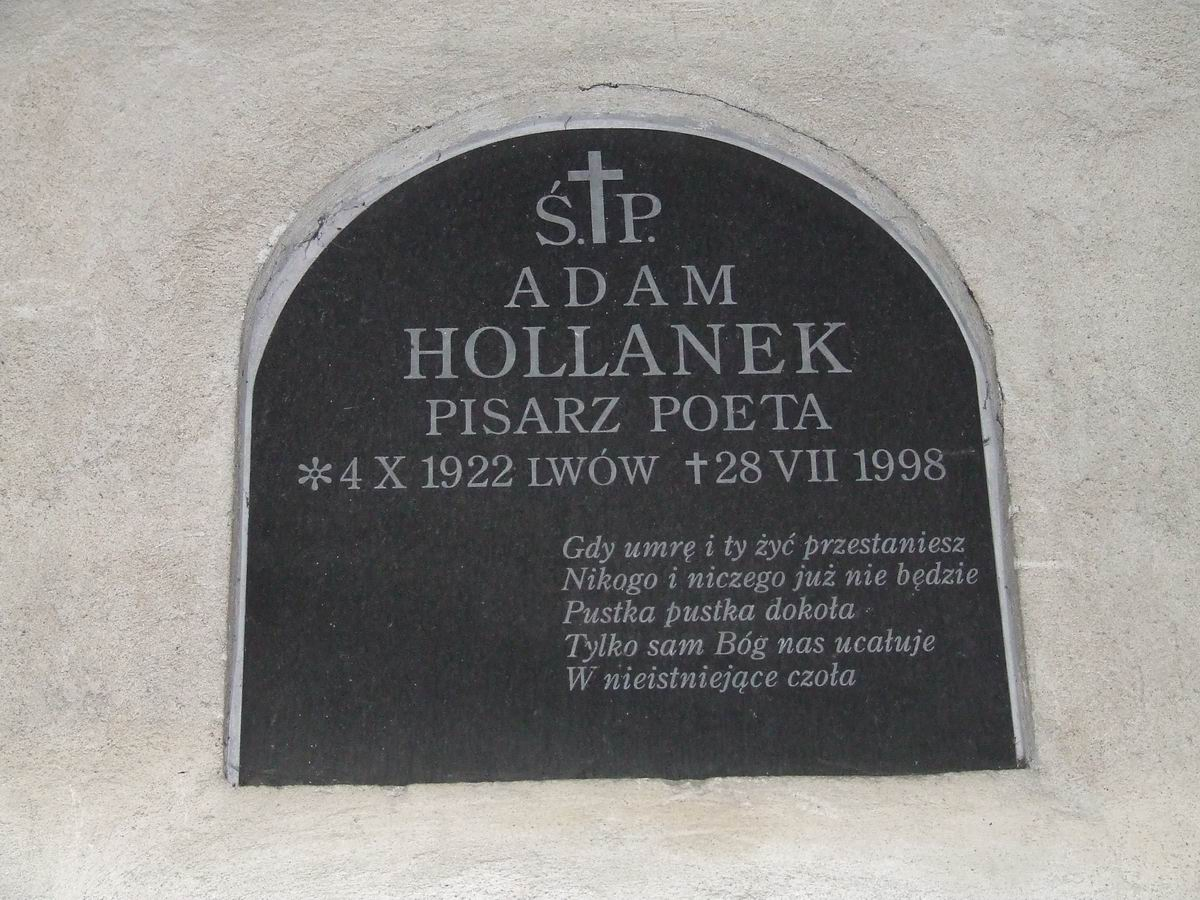 Adam Holanek, grób na Starych Powązkach w Warszawie